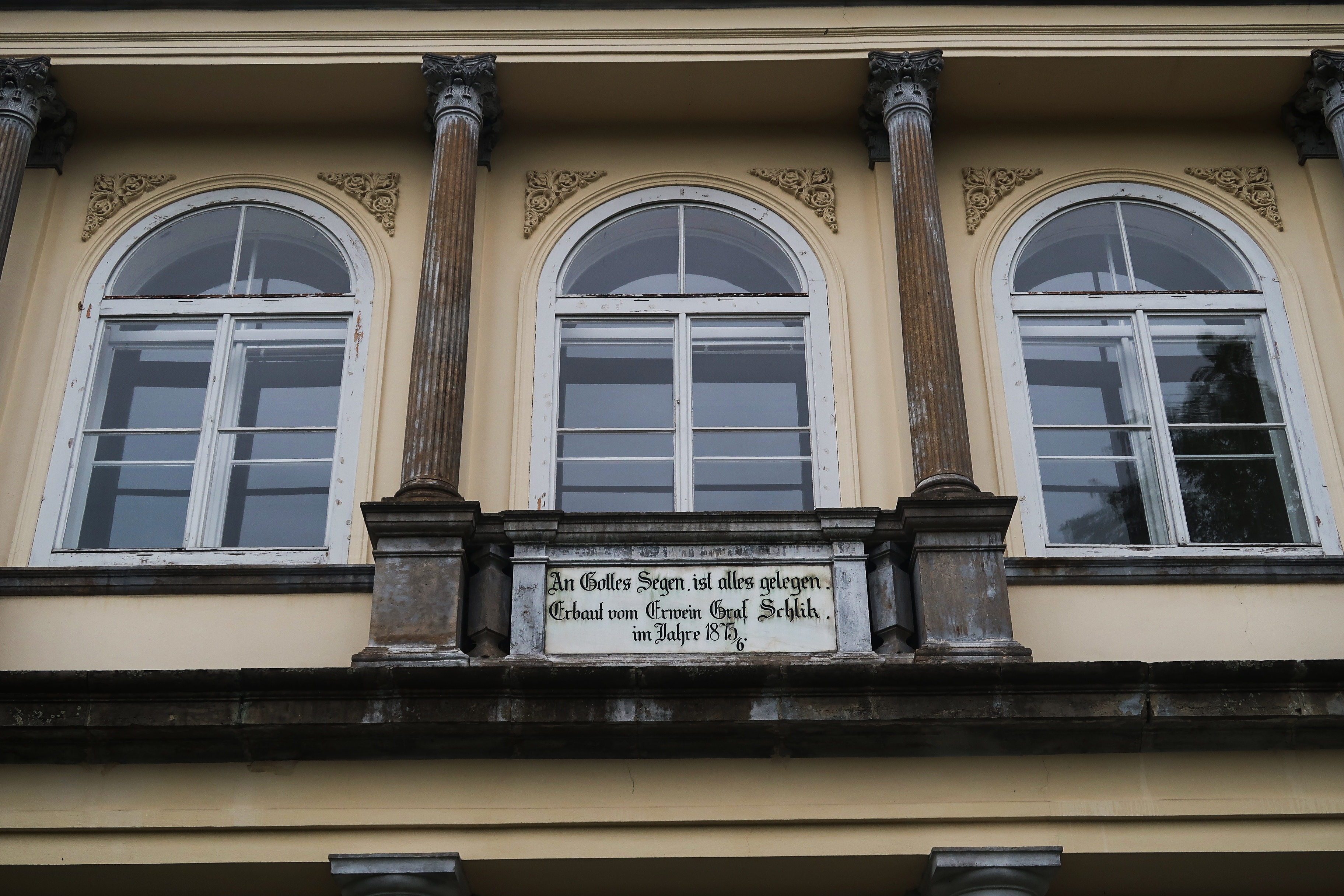 Nápis na zahradním průčelí zámku připomínající dostavbu z roku 1875